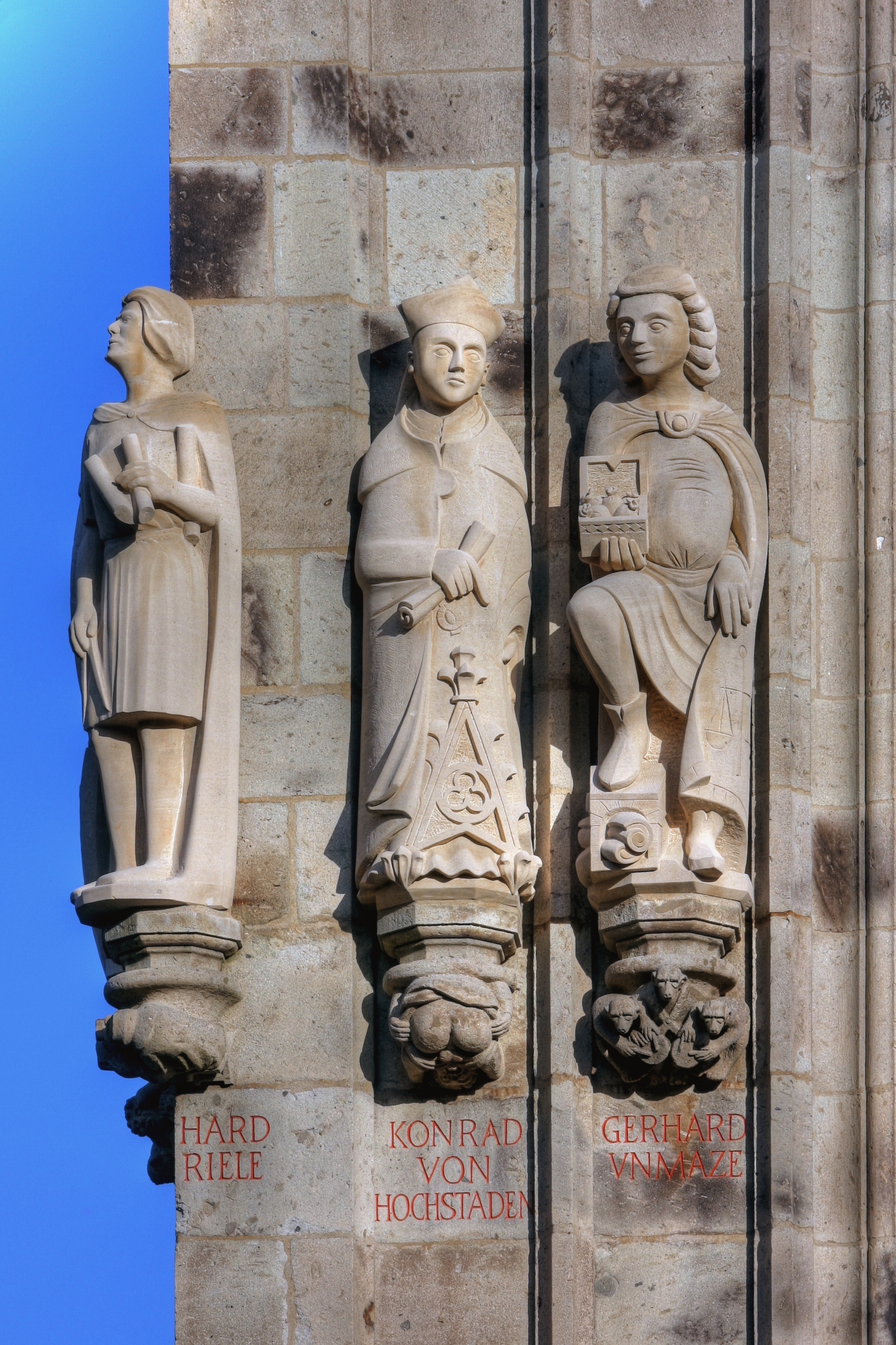 Rathausturm Köln mit den Figuren von: Meister Gerhard (von Riele), Konrad von Hochstaden, Gerhard Unmaze Details zu den Statuen: Bildhauer der Meister Gerhard-Statue: Hilarius Schwarz Bildhauer der Konrad von Hochstaden-Statue: Rainer Walk Bildhauer der Gerhard Unmaze-Statue: Rainer Walk Details zu den Konsolen: Thema der Konsole unter der Statue des Meister Gerhard: „Schreiber“. Bildhauer: Gerd Haas Thema der Konsole unter der Statue des Konrad von Hochstaden: „Kölner Spiegel“. Bildhauer: Herbert Rausch (Was macht der da?) Thema der Konsole unter der Statue des Gerhard Unmaze: „Affen“. Bildhauer: Gerd Haas